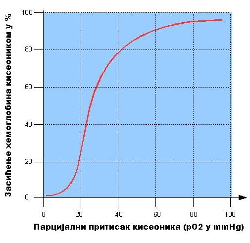 Крива засићења хемоглобина кисеоником на различитим парцијалним притисцима кисeоника, Autor dr Milorad Dimić, Niš. 08.2009.